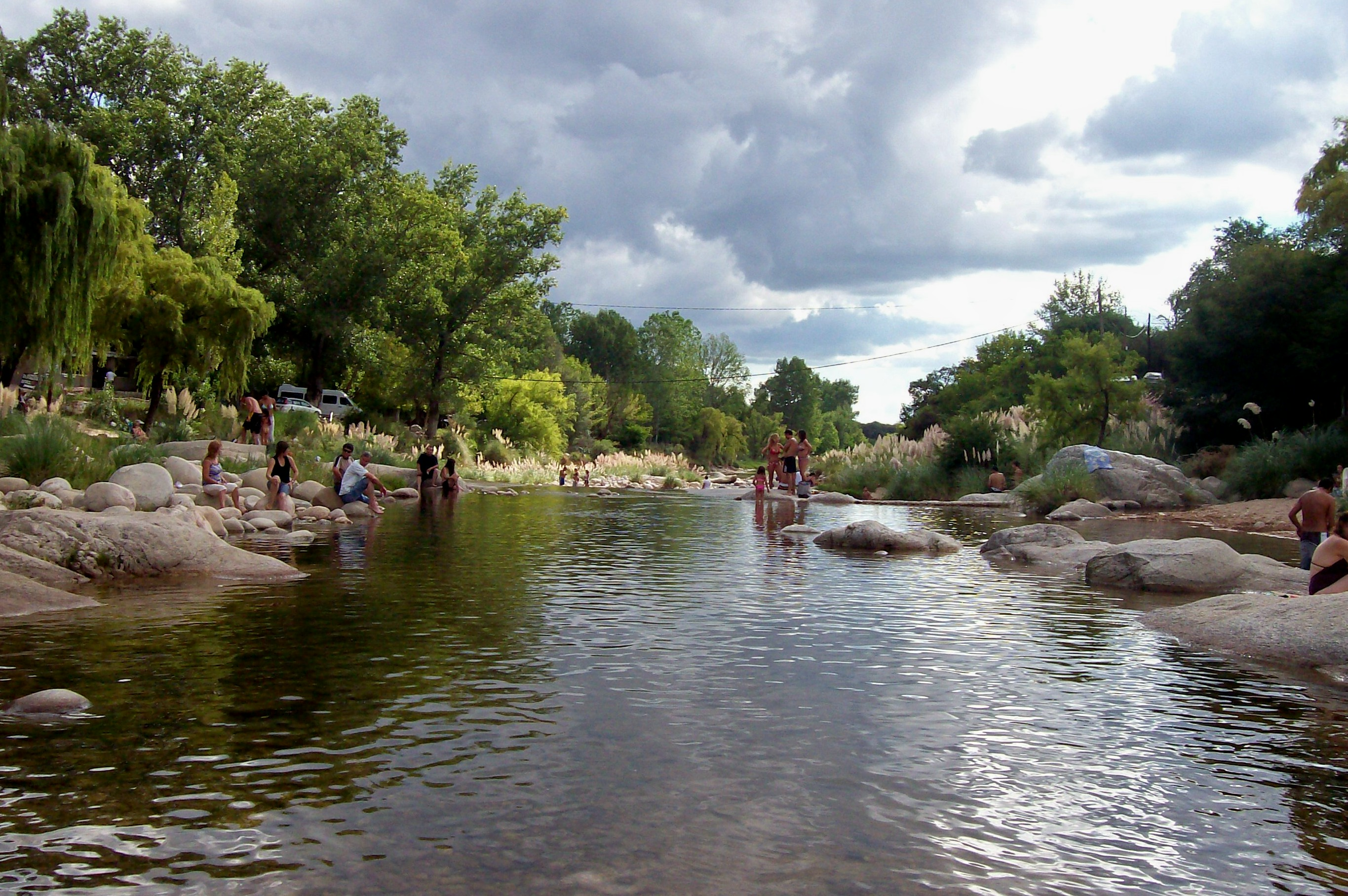 "Paso de las Tropas", en el río chico de Nono, provincia de Córdoba, Argentina.